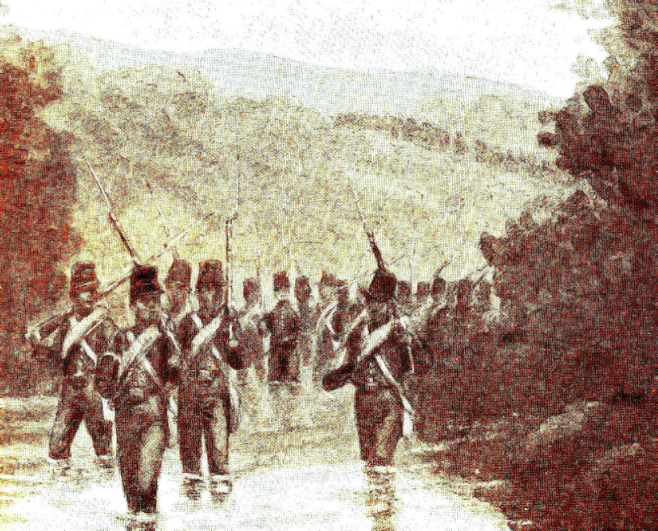 Mars van het zevende bataljon door de Sansit